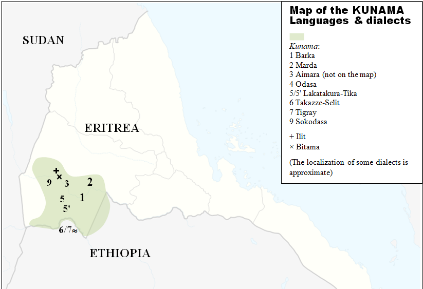 Map of the Kunama Languages